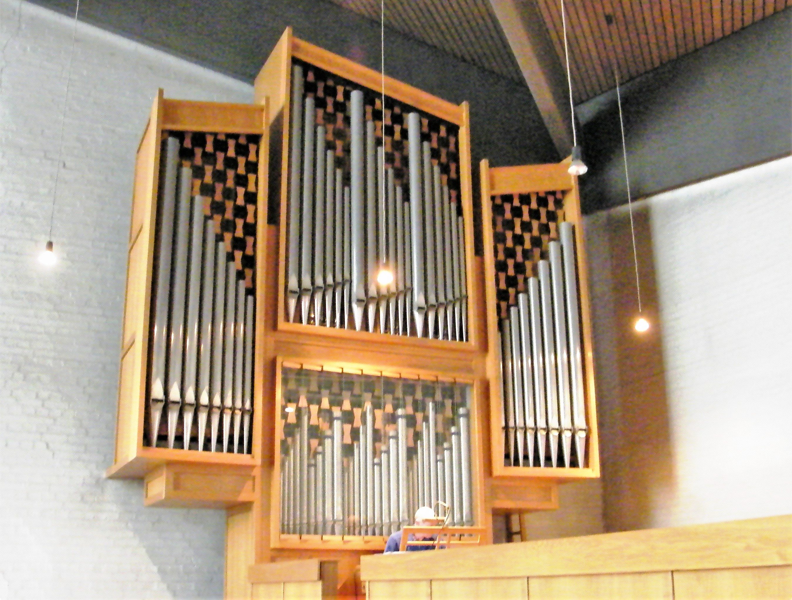 Mayer-Orgel St. Elisabeth Riegelsberg, jetzt St. Severin 2011